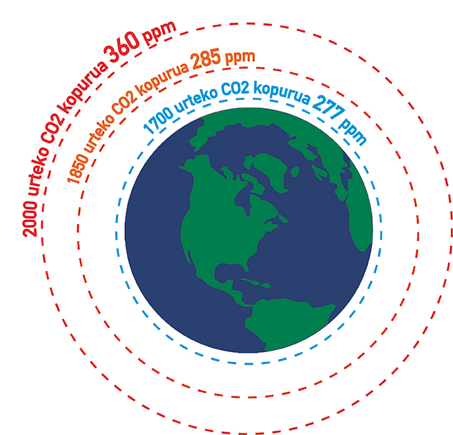 Ilustrazioz eta datu objetiboz azaltzen ditu azken urteetako CO2 kopuruen aldaketak atmosferan